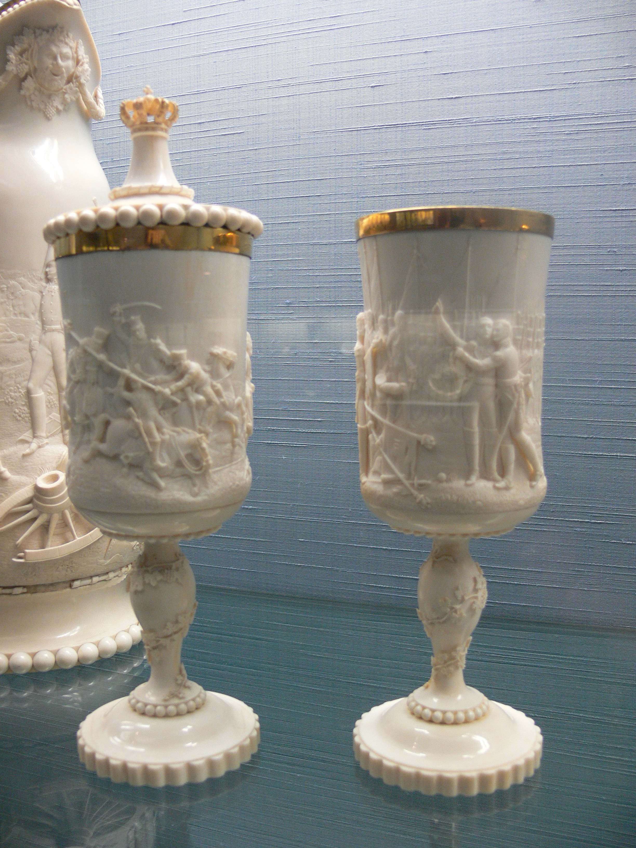 Prunkkanne und zwei Pokale mit Szenen aus den Befreiungskriegen: Pokale mit Schlachtenszenen; Elfenbein (mit silbervergoldetem Einsatz); von Leberecht Wilhelm Schulz, Meiningen 1842 Kunstgewerbemuseum Berlin, Inv. Nr. Hz 1294 und Hz 1295 (Kanne und Pokale)